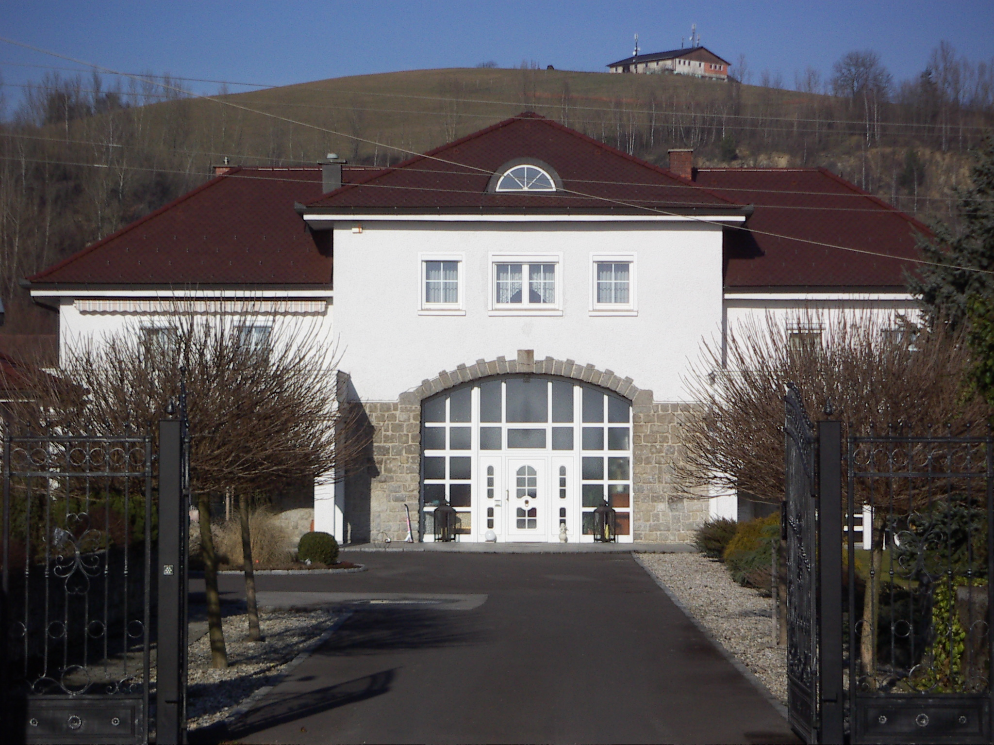 Das Jourhaus des ehemaligen Konzentrationslagers Gusen I wurde Ende 1941 von KZ-Häftlingen errichtet. Es diente als Torgebäude und beherbergte im Bereich rechts neben dem Eingangstor das ehemaliger Lagergefängnis (den sog. "Bunker"). Dort wurden zahlreiche Menschen eingekerkert, grausam gefoltert und ermordet. Dieses Jourhaus wurde 1965 durch die Republik Österreich zunächst an die Gemeinde Langenstein verkauft und von dieser dann weiter privatisiert. Es dient seit vielen Jahren als repräsentatives, privates Wohnhaus. Am 7. April 1944 wurde in diesem Gebäude z.B. der bedeutende österreichische Pädagoge, Priester und Widerstandskämpfer Dr. Johann Gruber nach längeren, schweren Folterverhören durch den Lagerkommandanten des KL Gusen I grausam ermordet.